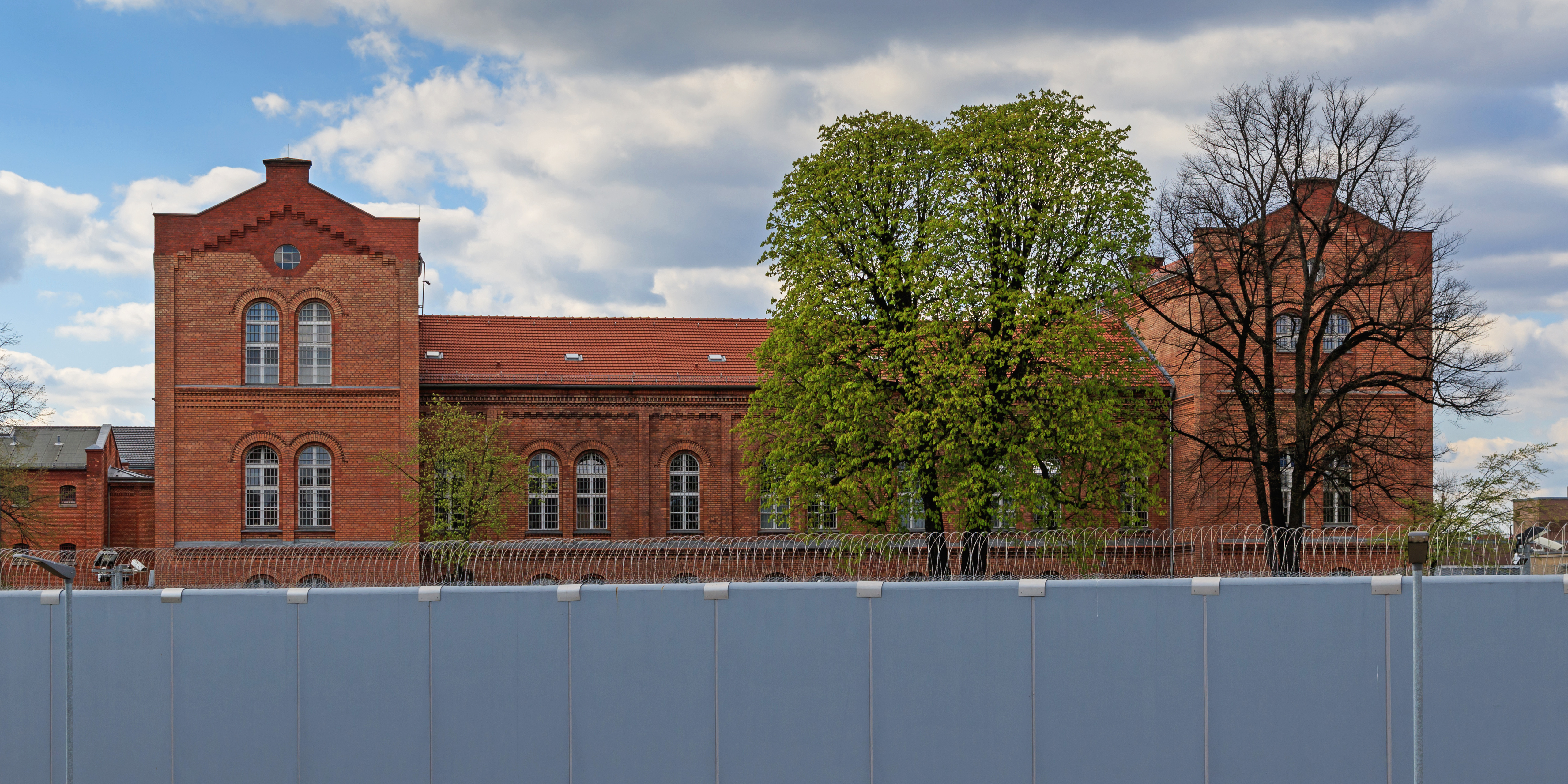 Blick auf JVA Plötzensee vom Friedrich-Olbricht-Damm / Ecke Saatwinkler Damm